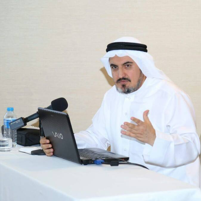 الدكتور محمد عياش الكبيسي